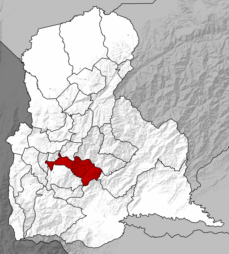 Municipio Cárdenas - Táchira